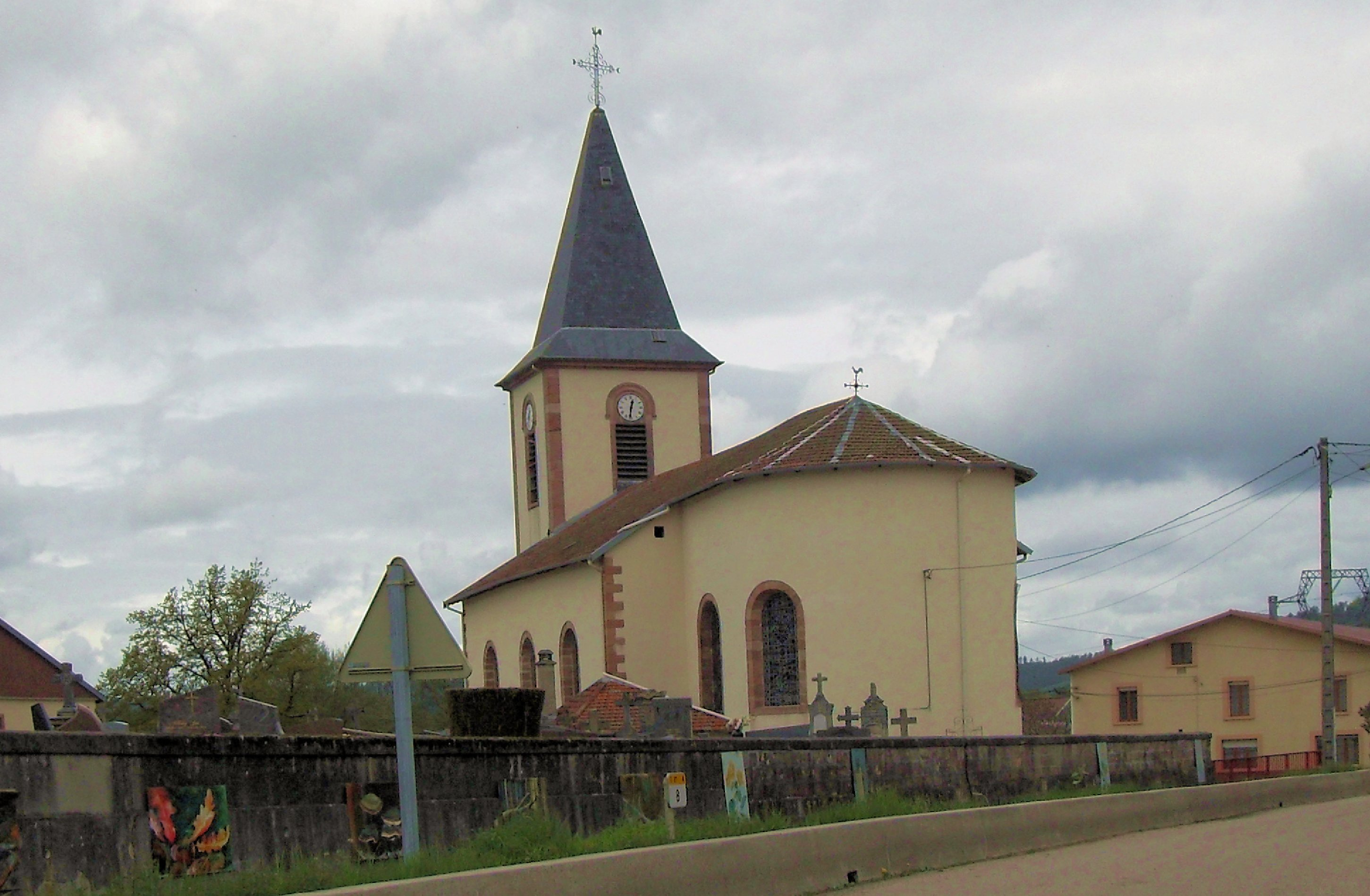 L'église_Sainte-Madeleine et Sainte-Gertrude de Houssière